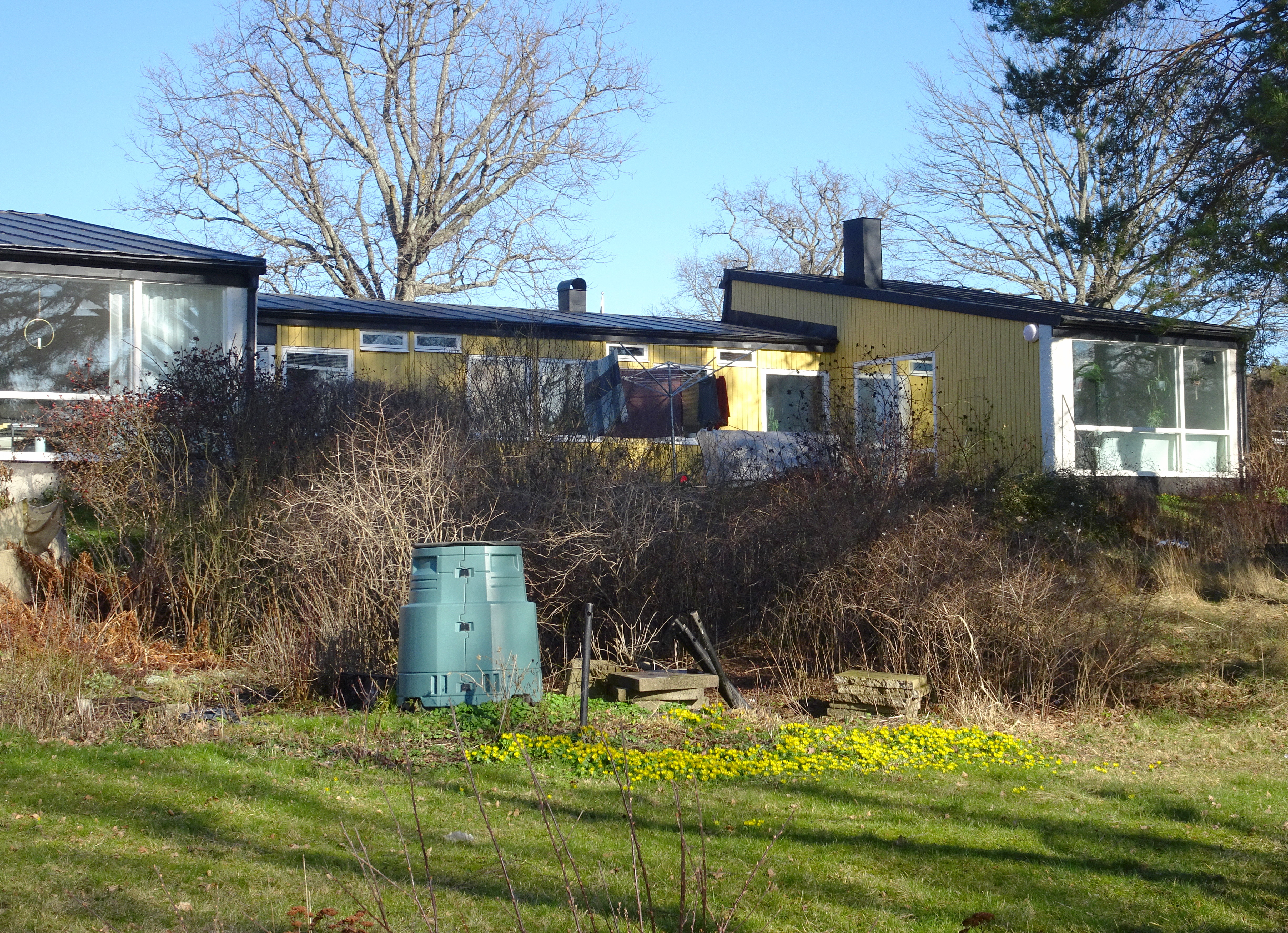 Radhusområdet Sjöträdgården, Hässelby strand, byggår 1957-1958 Alf Bydén (Arkitekt) Bostadsrättsföreningen Sjöträdgården (Byggherre) Bo Stigwall (Byggmästare) Dag Åberg (Arkitekt) Eric Anjou (Trädgårdsarkitekt)